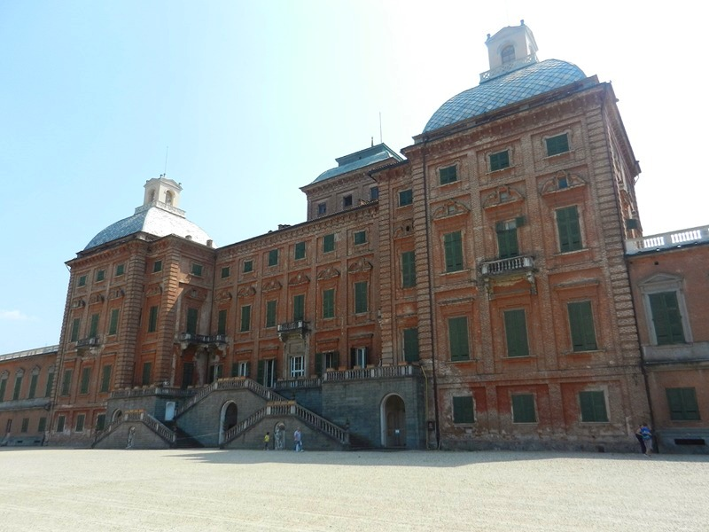 Racconigi - Castello Reale (facciata posteriore)